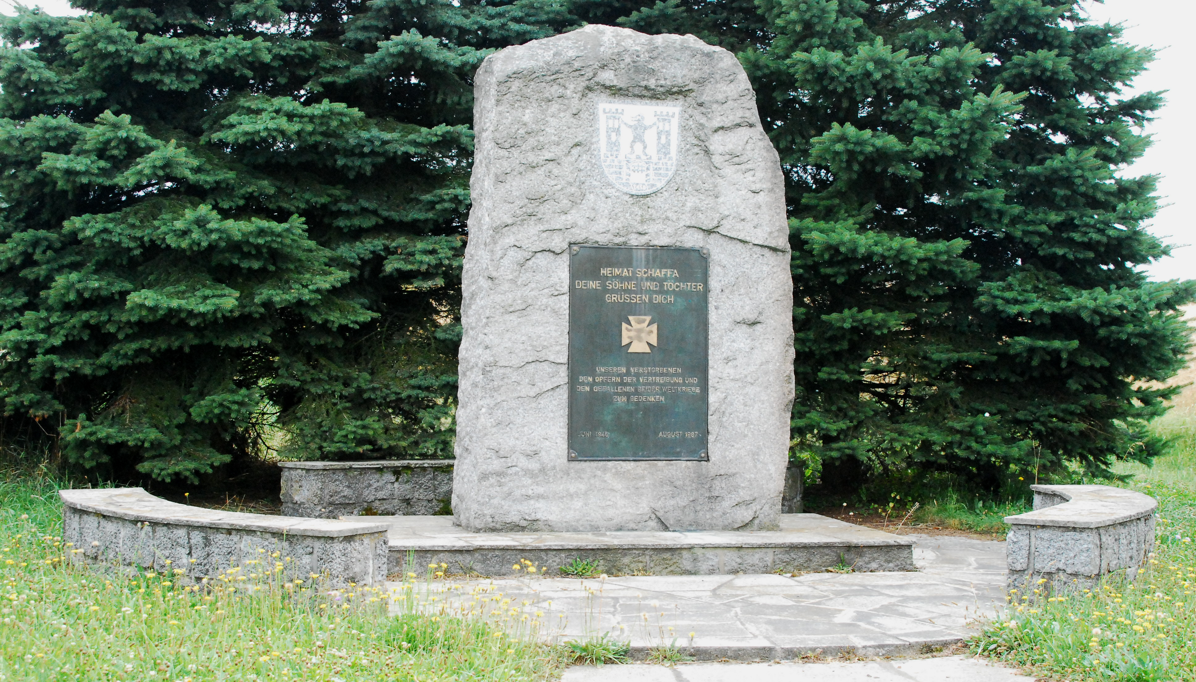 Denkmal zur Erinnerung an die Vertreibung der deutschstämmigen Bevölkerung aus Schaffa (Safov) 1945 bei Langau